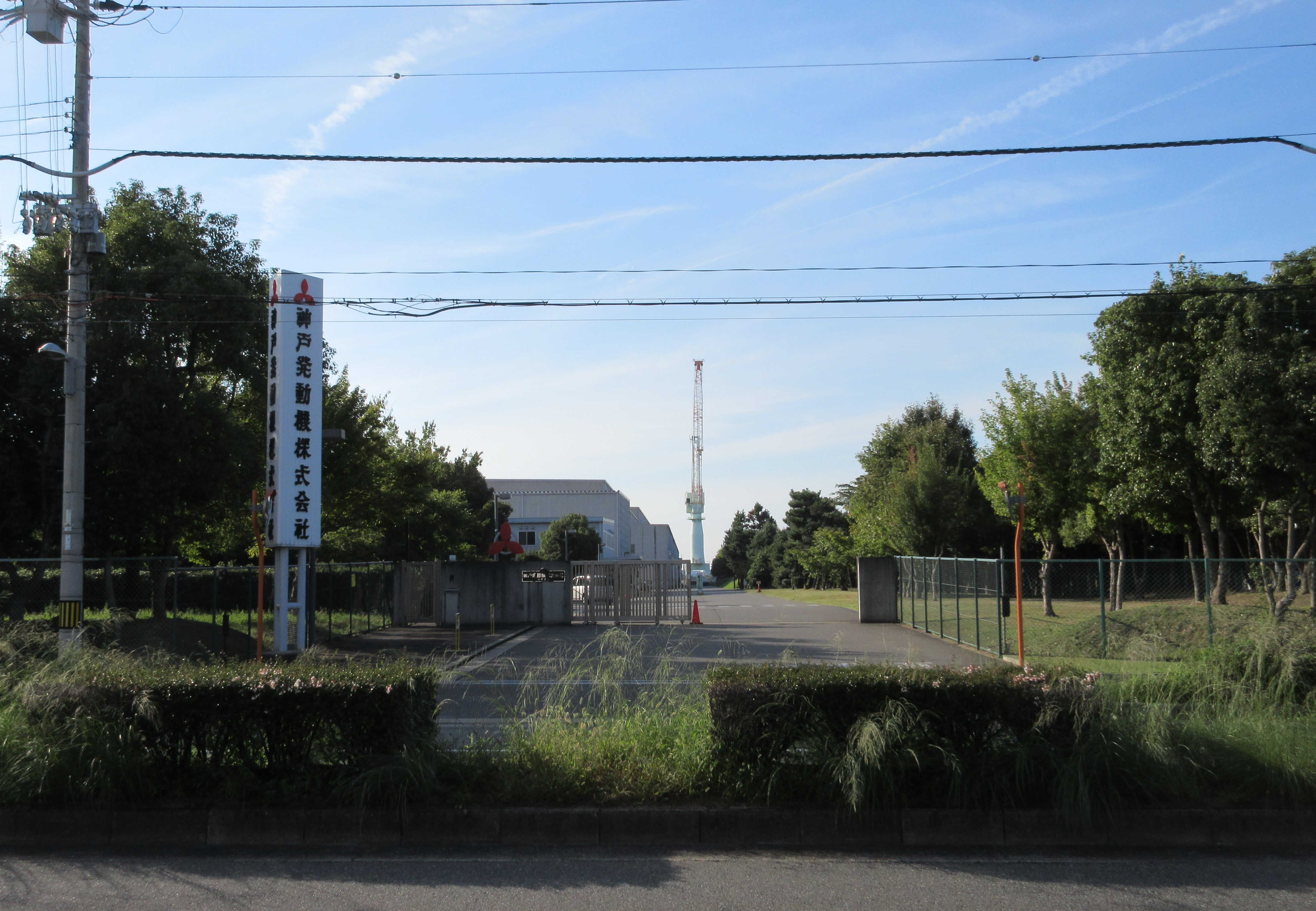 神戸発動機本社